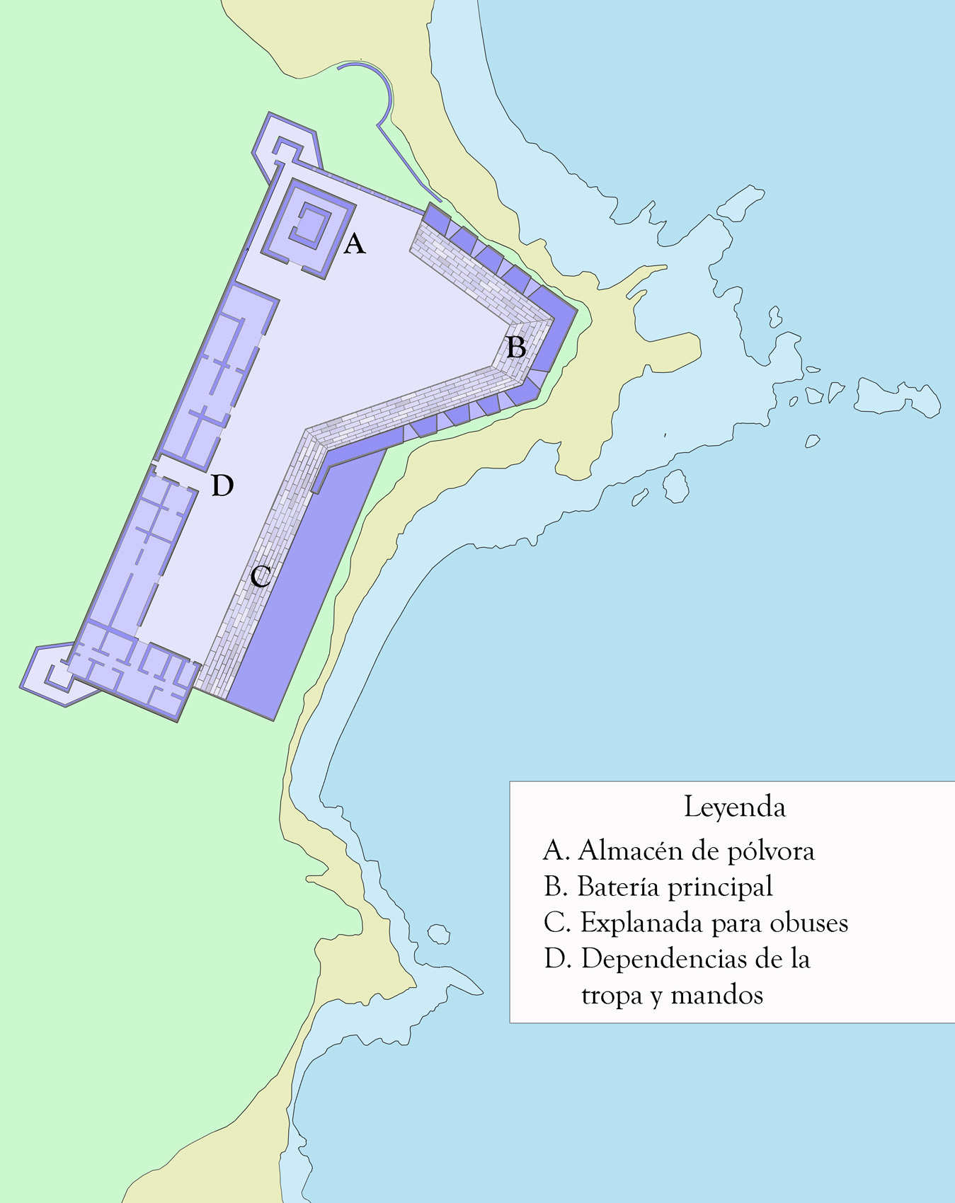 Plano del Fuerte de Santiago de Algeciras. Imagen realizada para Wikimedia a partir de planos antiguos.